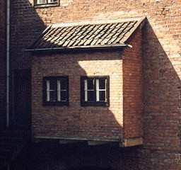 zdjęcie własne